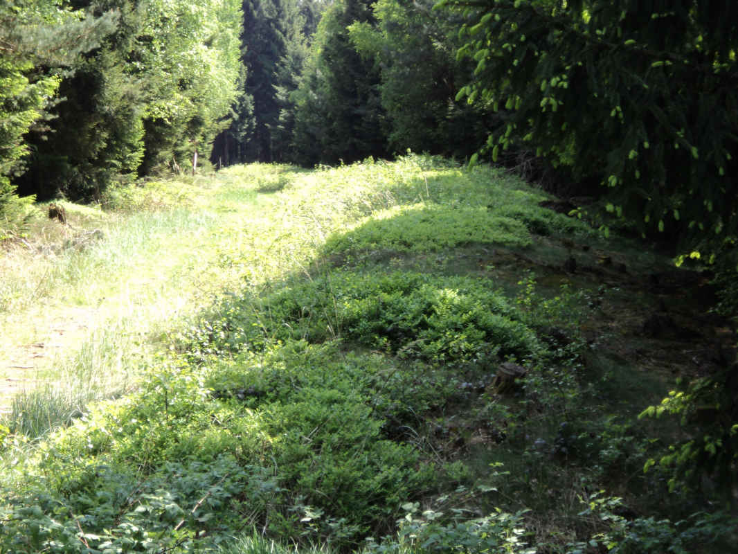 Reste des obergermanisch-raetischen Limes bei Hillscheid